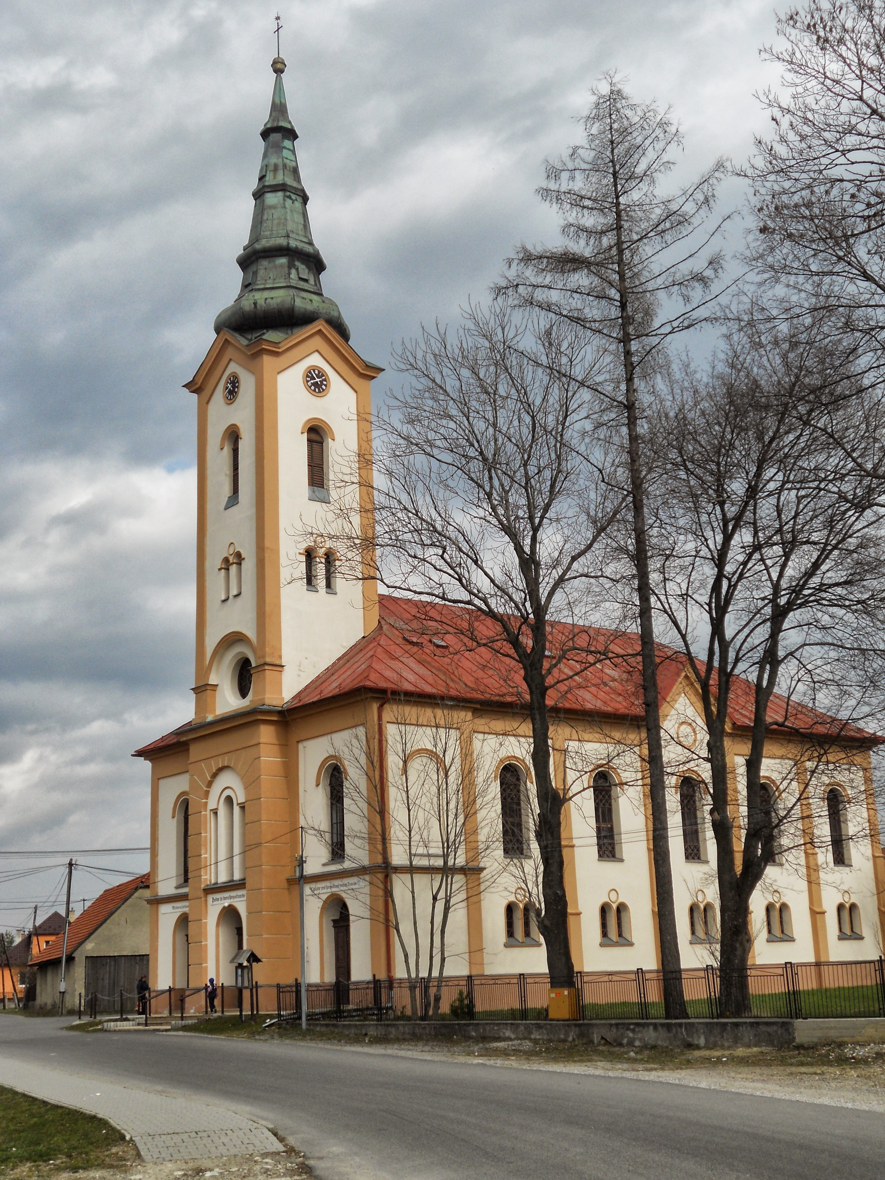 Evanjelický kostol Važec